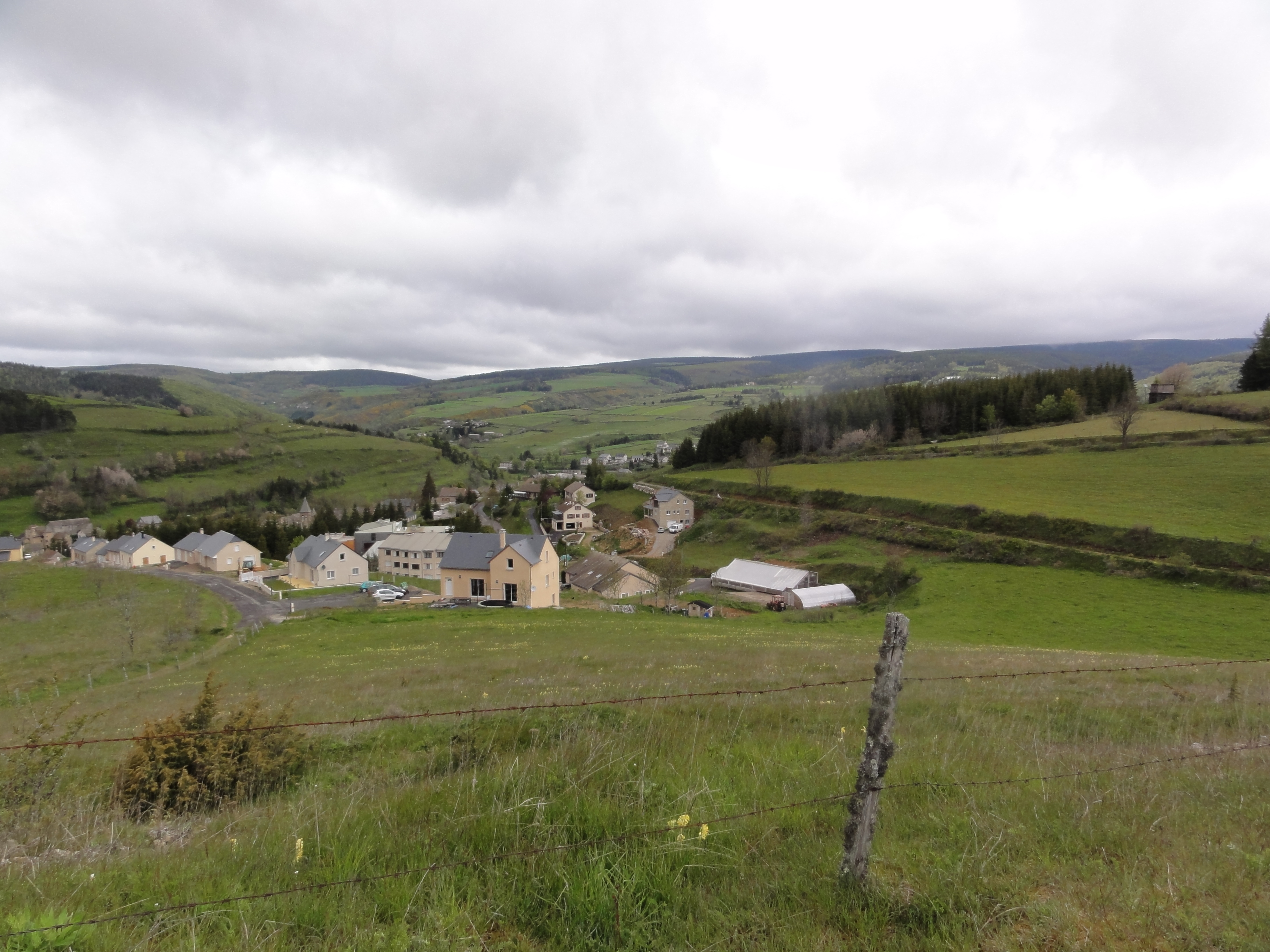 Chemin de Stevenson